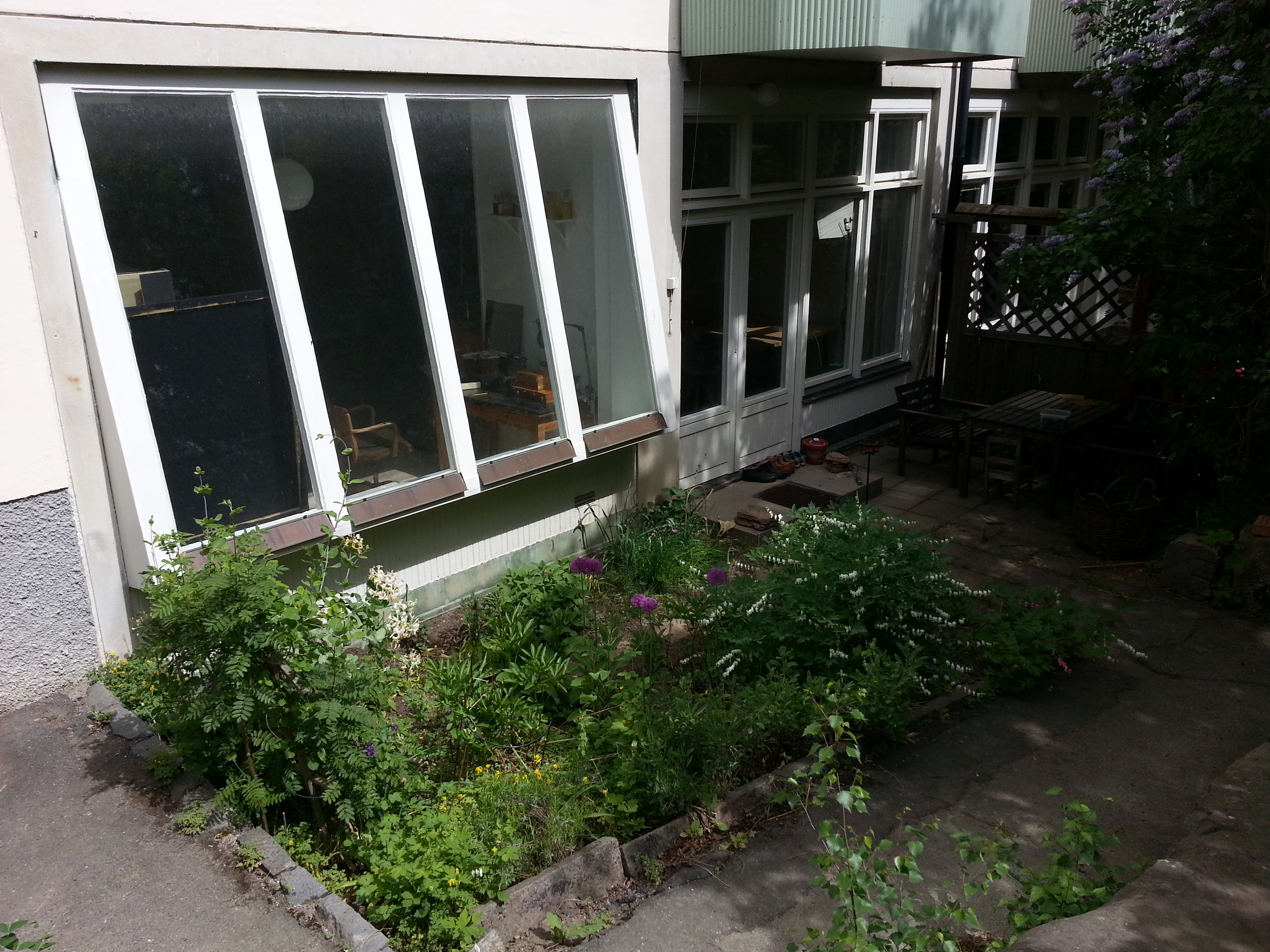 Kvarteret Regnbågen ateljéfönster